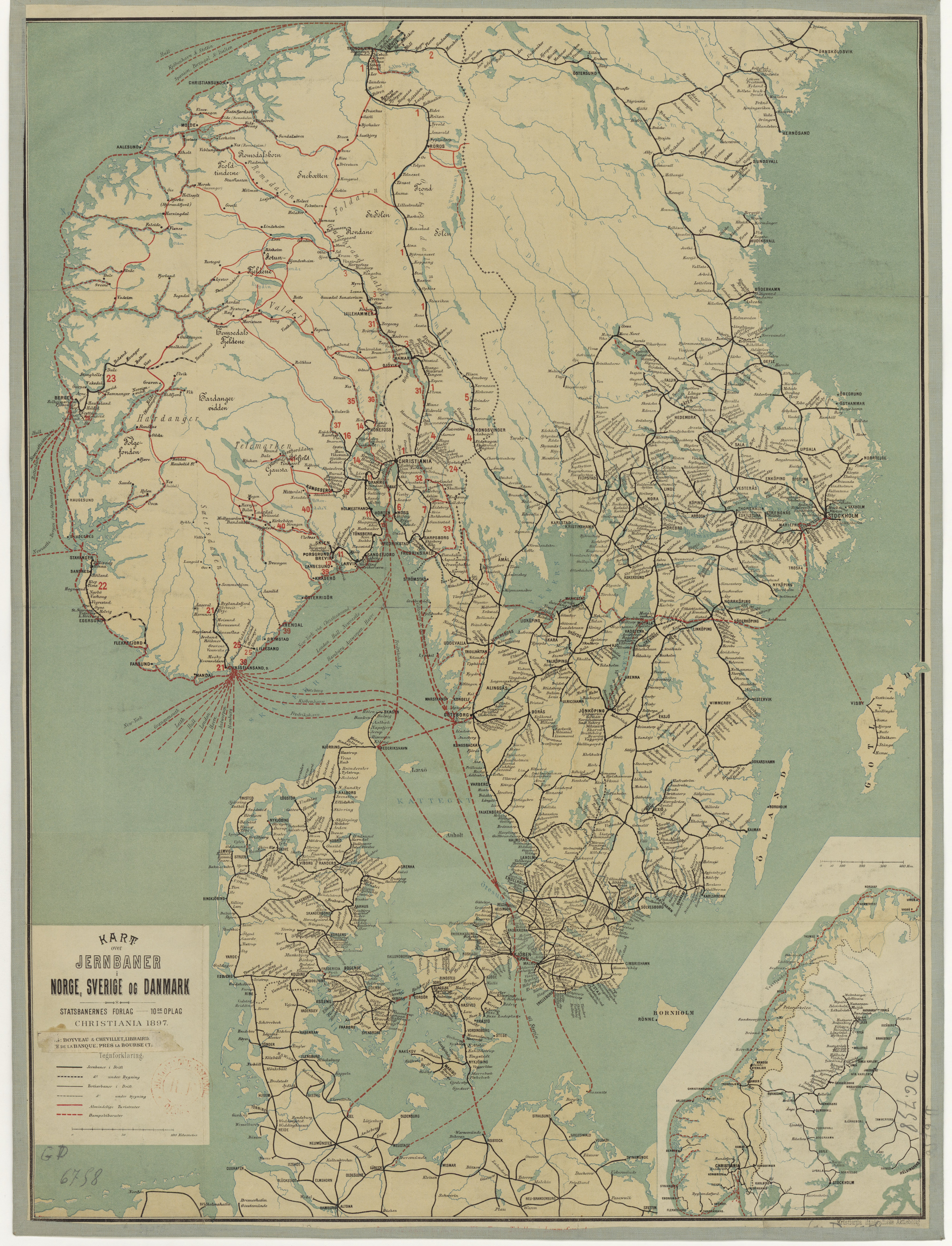 «Kart over jernbaner i Norge, Sverige og Danmark. Statsbanernes forlag — 10de oplag. Christiania 1897.»